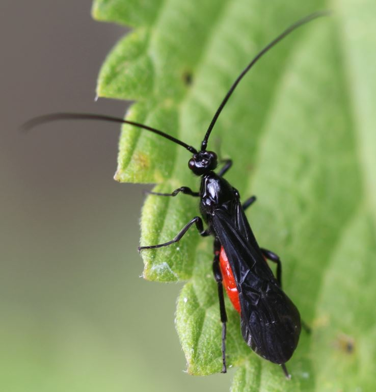 Brackwespe, vermutlich Iphiaulax impostor, am 26. Juni 2018 in der Schwetzinger Hardt